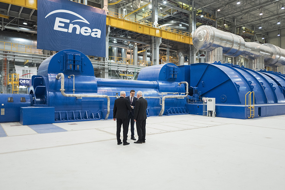 Świerże Górne. Premier Mateusz Morawiecki wziął udział w uroczystości oddania do użytku Bloku Energetycznego B11 w Elektrowni Kozienice.